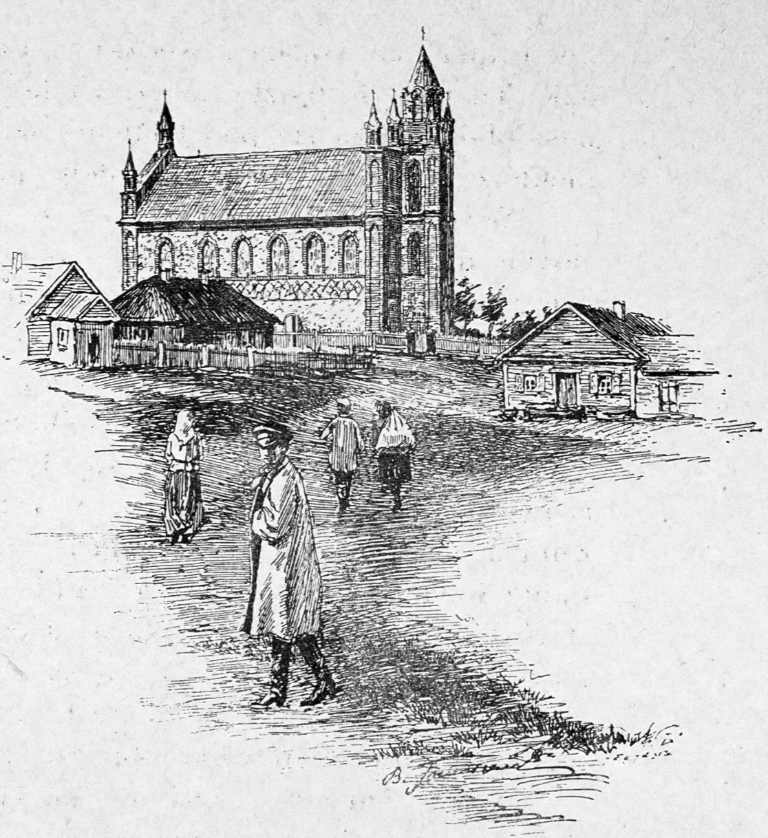 Беларуская (тарашкевіца): Жупраны (Župrany), пляц Рынак (plac Rynak)